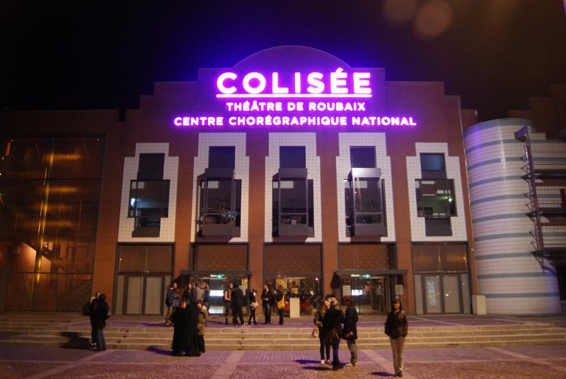 Façade du Colisée - Théâtre de Roubaix